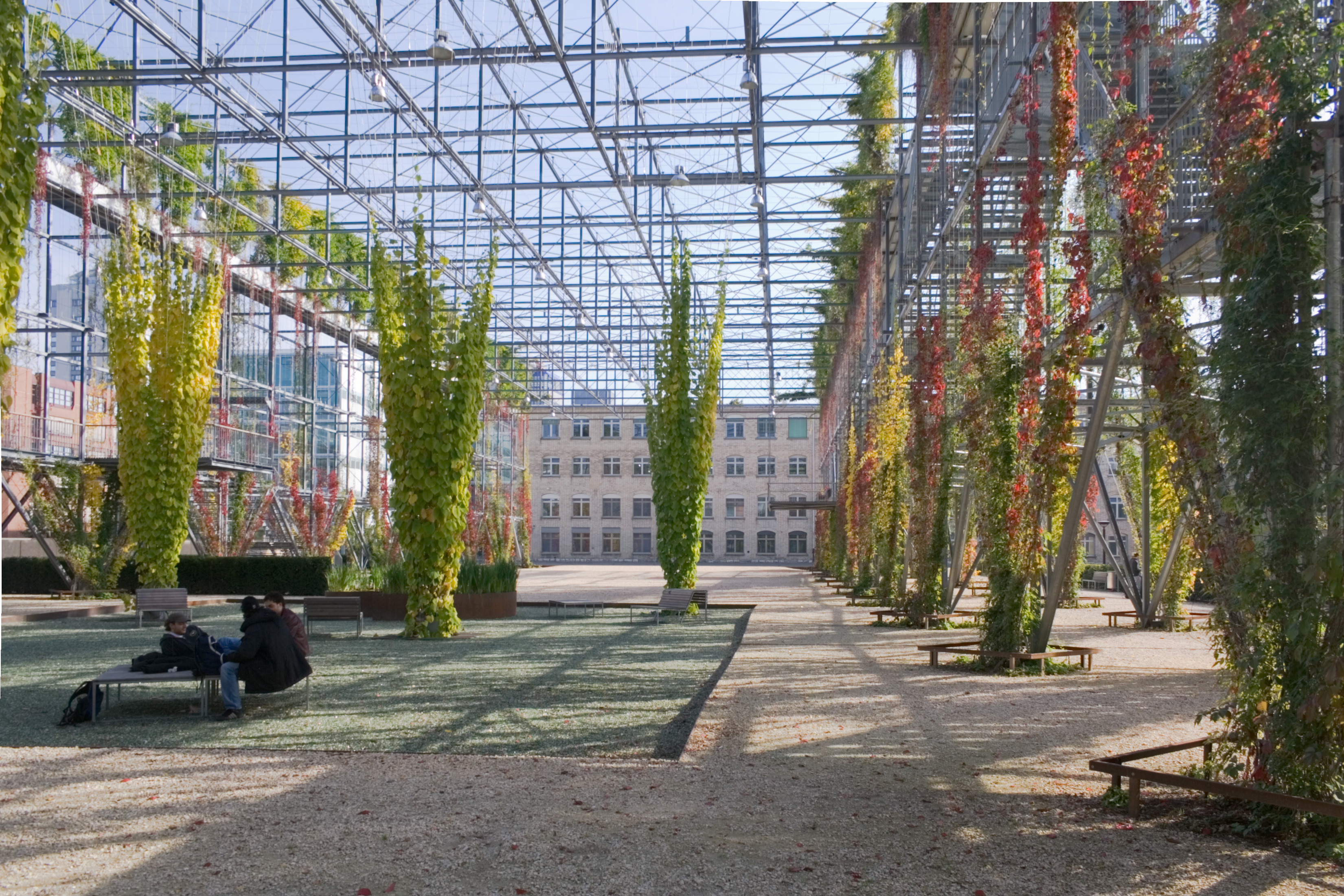 Der MFO-Park in Neu Oerlikon von innen gesehen. MFO steht für Maschinenfabrik Oerlikon, dem vormaligen Nutzer des Geländes.